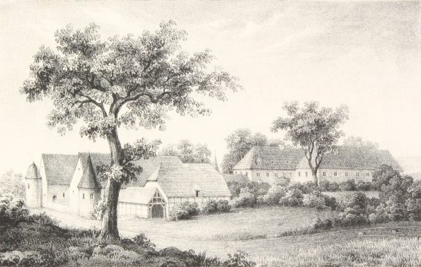 Steinheim Gut Eichholz